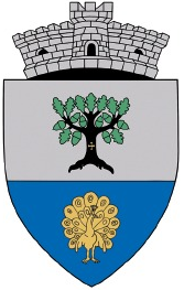 Stema Curtești, Botoșani